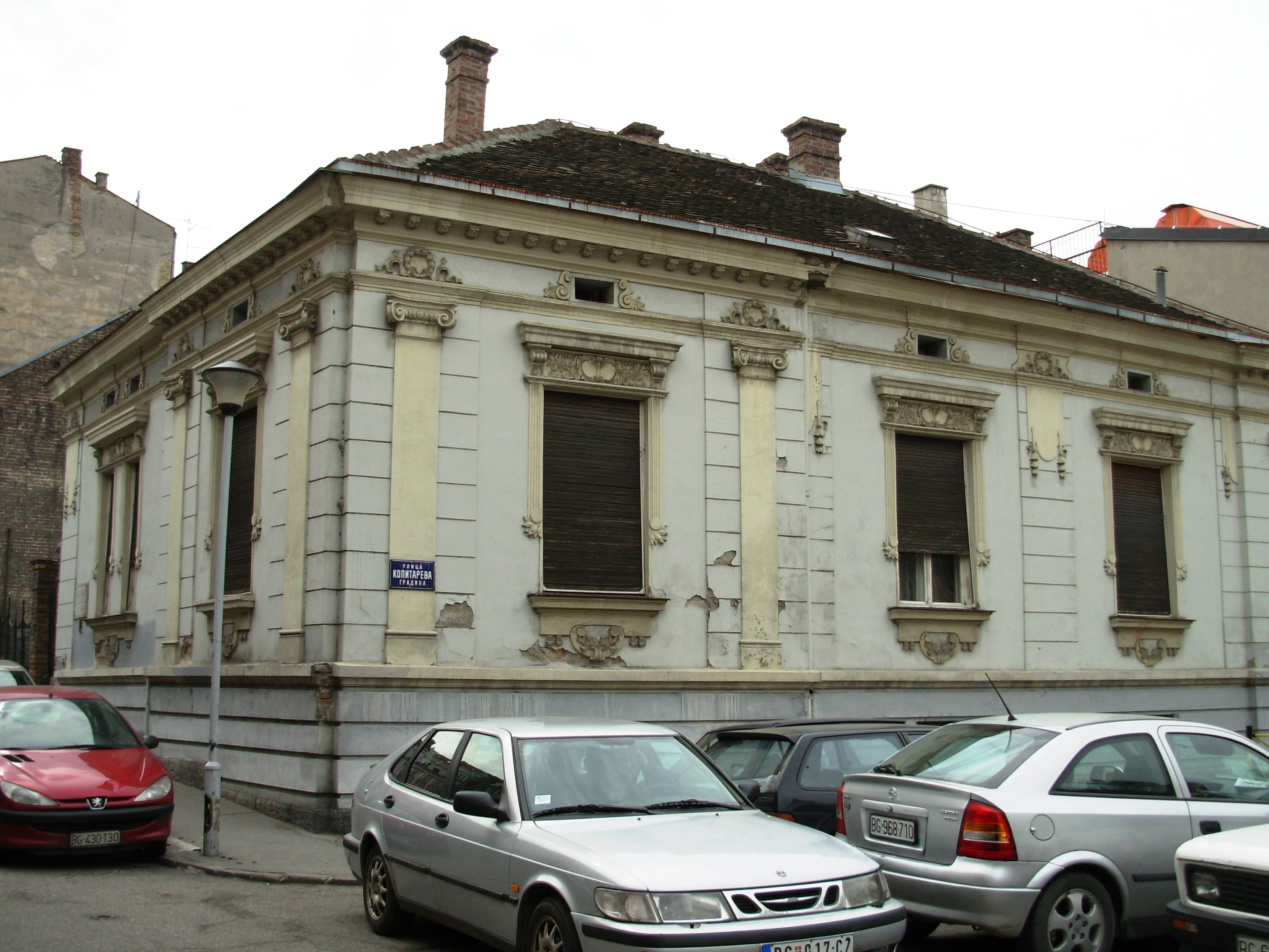 Кућа у којој је живео Јован Цвијић. Београд, Копитарева градина. Сликао Голдфингер